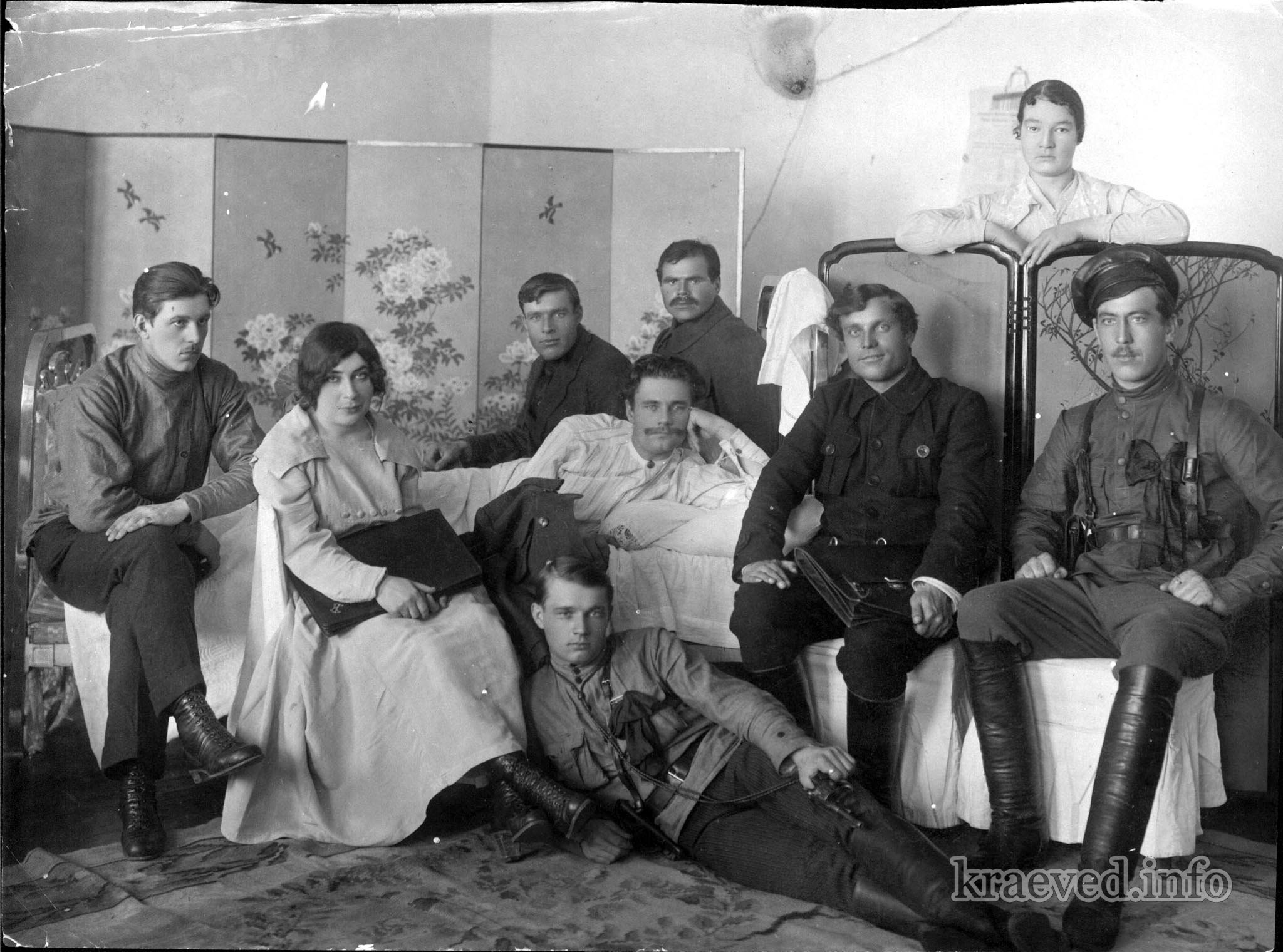 Командование Николевского округа (фронта) Красной Армии в конце марта 1920 г.